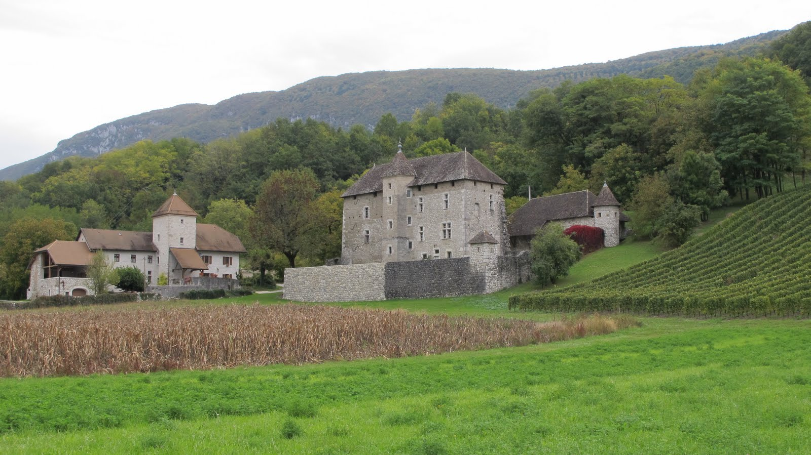 73310 Serrières-en-Chautagne, France